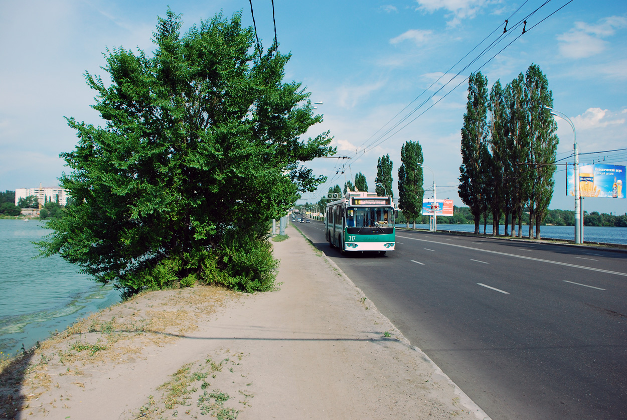 Троллейбус на Чернавском мосту